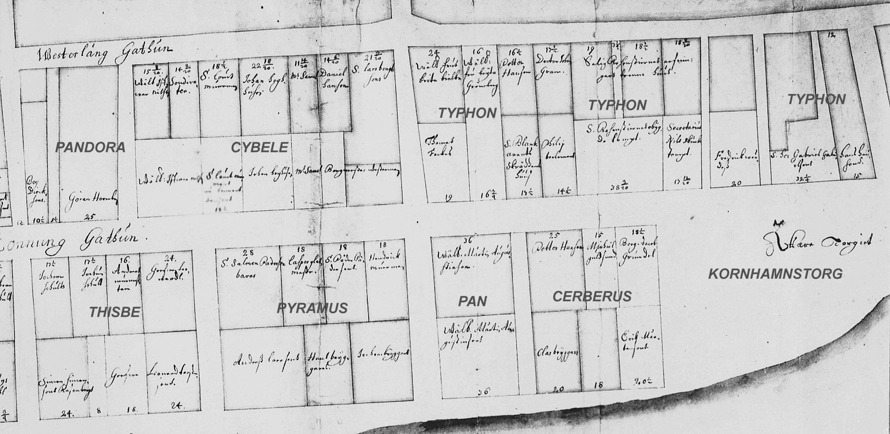 Tomtkarta över sydvästra Stadsholmen 1651